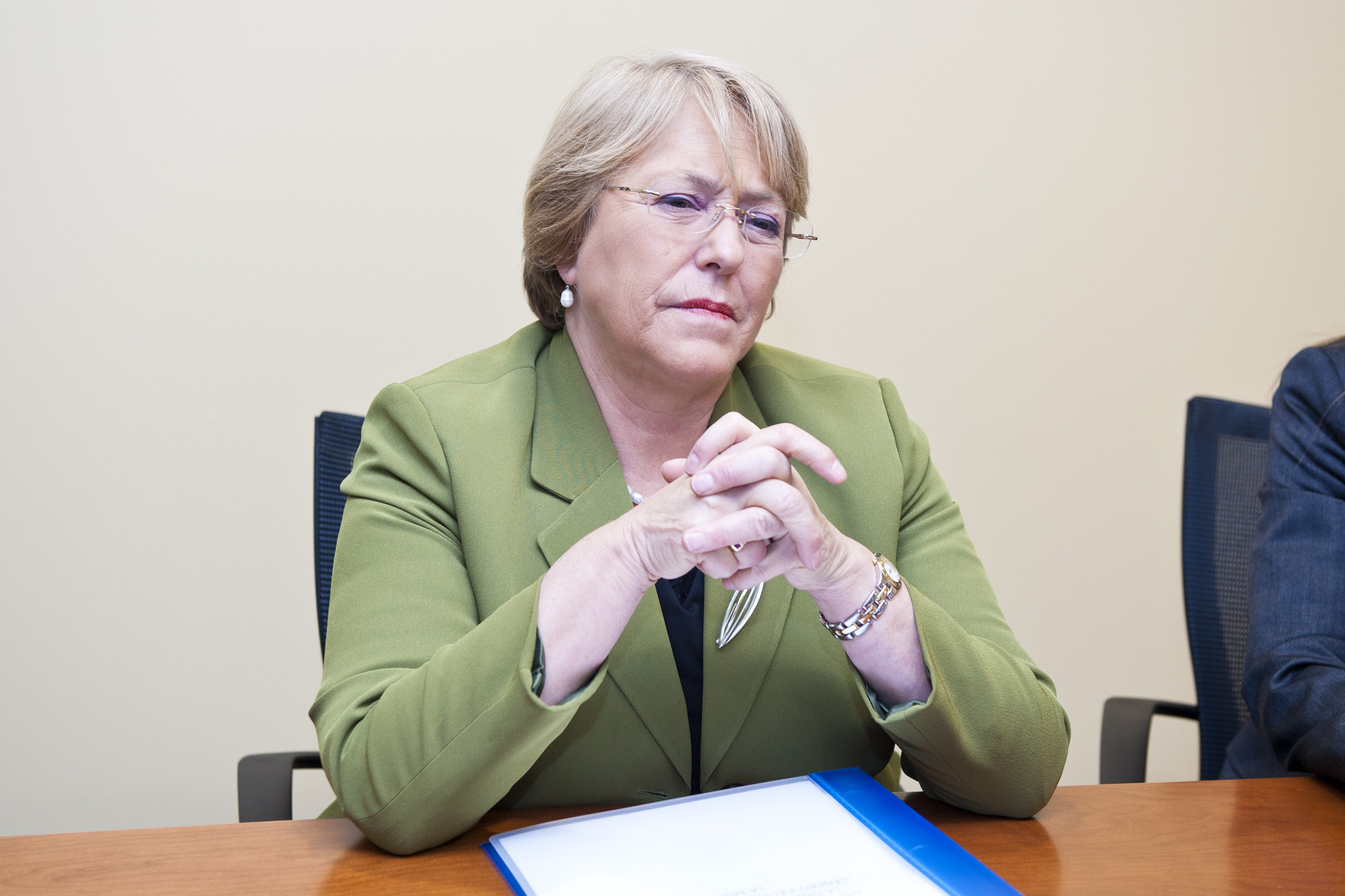 NBE Emakumeak-ek eta Eusko Jaurlaritzak lankidetza hitzarmen bat sinatu dute Latinoamerikan genero berdintasuna bultzatzeko 2